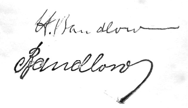 Unterschrift Heinrich Bandlow auf Gützkow - Manuskriptbuch